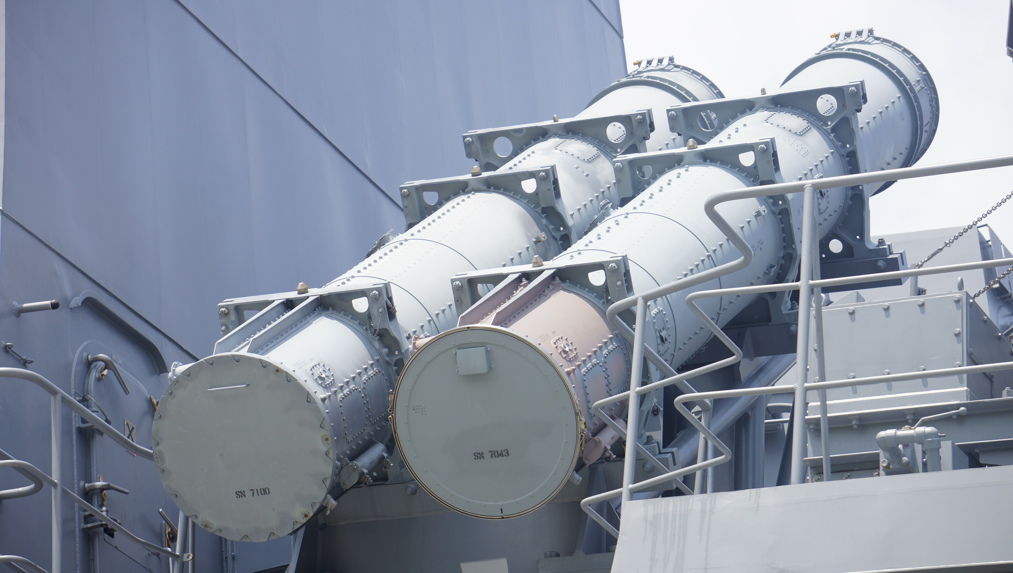 海上自衛隊 護衛艦ふゆづき（DD-118） 90式空対艦誘導弾（SSM-1B）発射筒。 2014年7月27日 舞鶴基地にて。